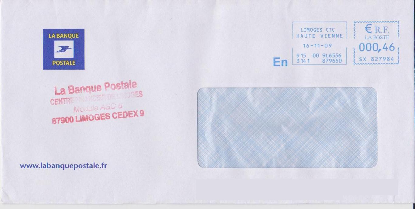 Lettre affranchie envoyer par La Banque Postale (centre financier de Limoges). Depuis janvier 2006, La Banque Postale affranchie les courriers à destination des clients, des bureaux de postes, etc...